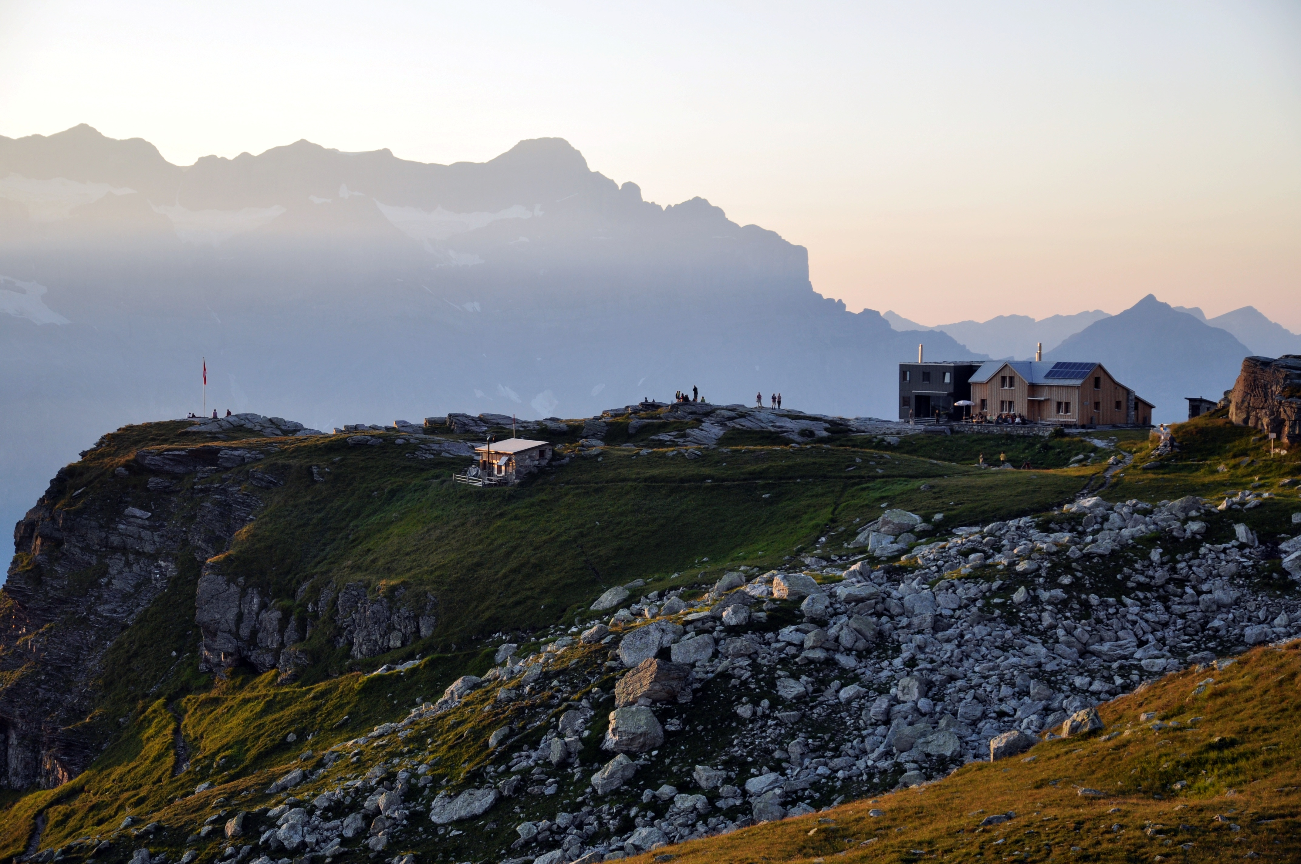 Leglerhütte, 2273 müM, von Süden gesehen. Im Hintergrund der Glärnisch.